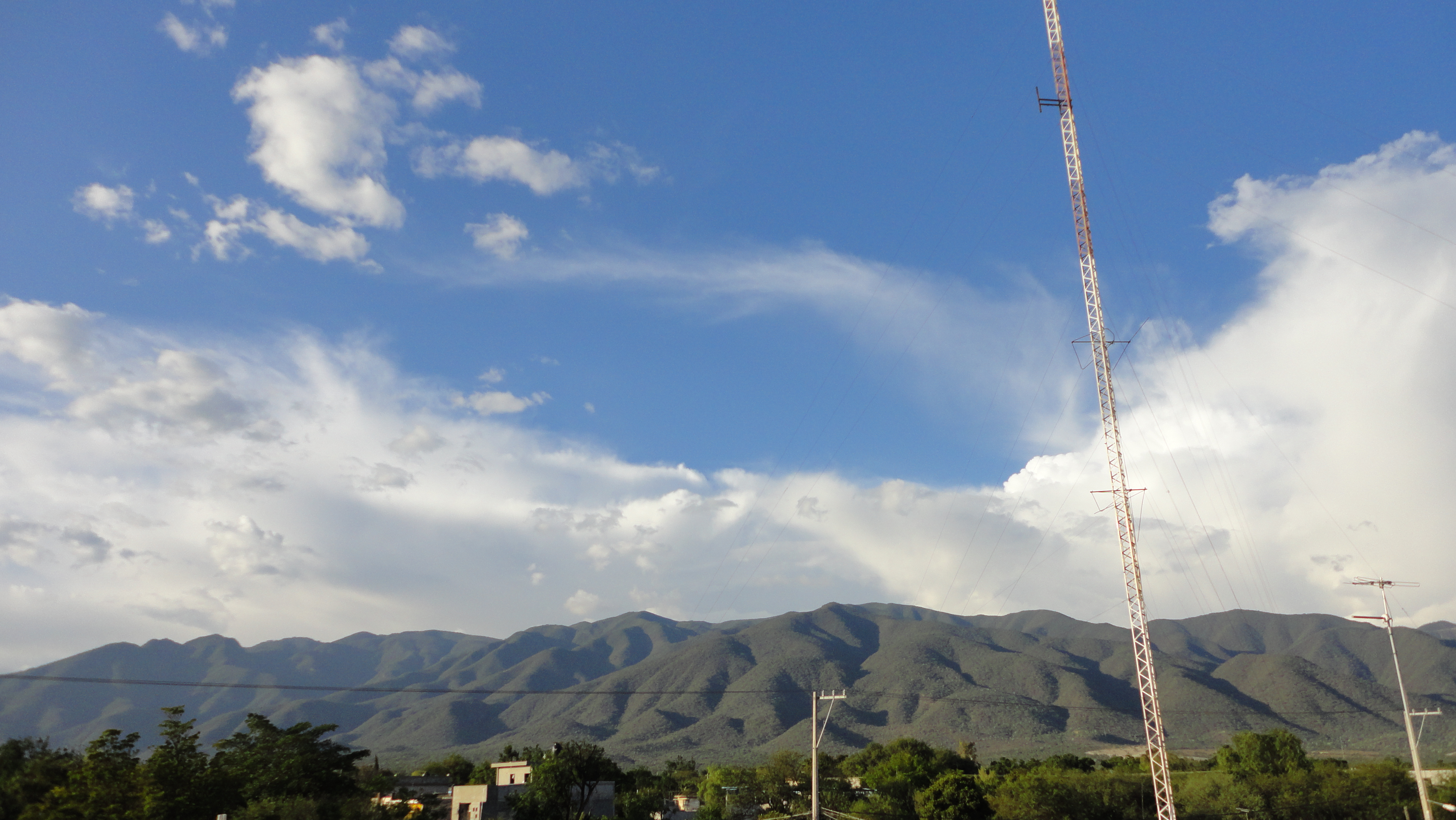 Vista de la Sierra desde Ajalpan